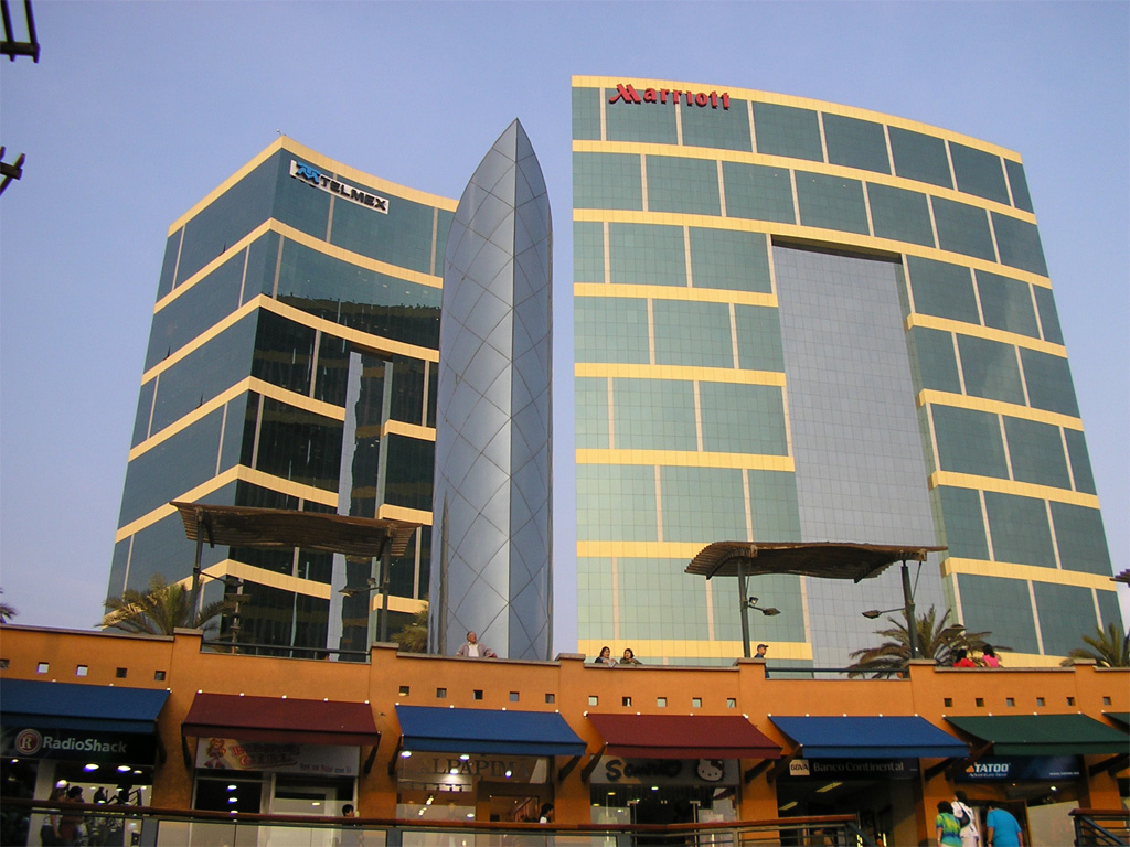 Lima Marriott Hotel in Miraflores.